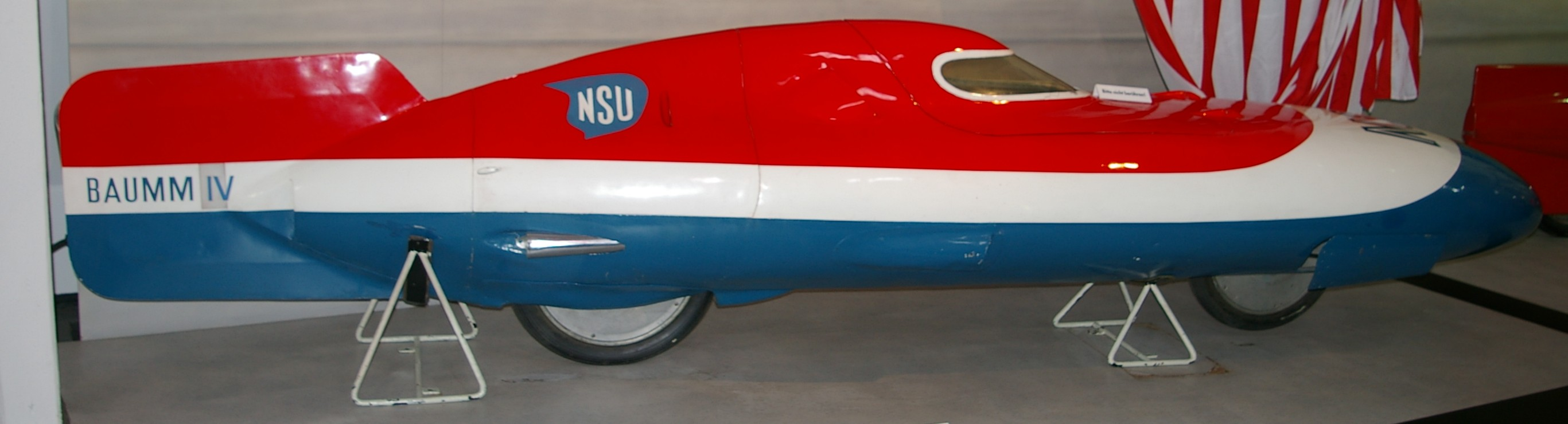 NSU-Baumm-Weltrekordmaschine. Museum Neckarsulm.